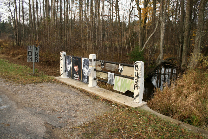 Кино